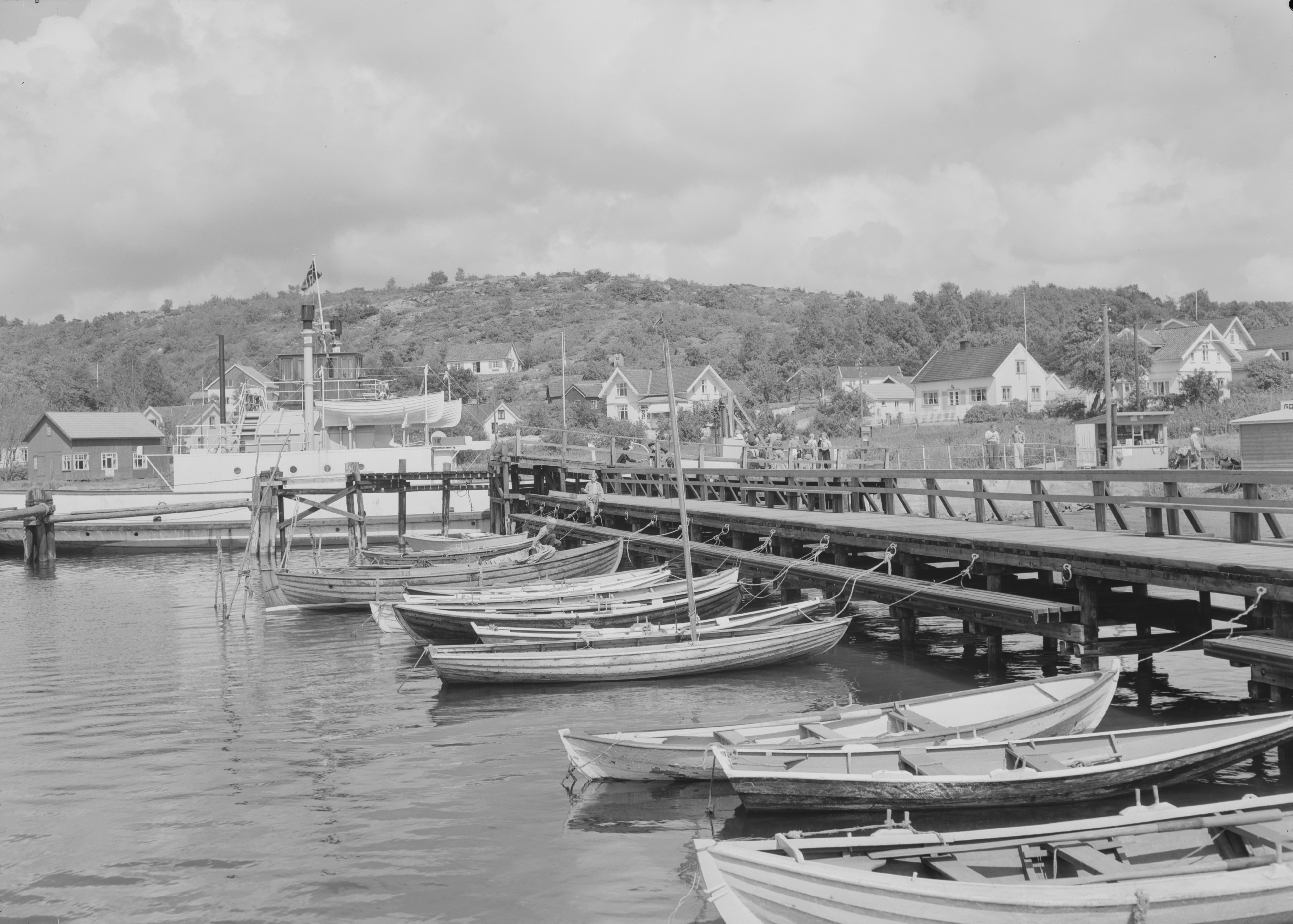 Bildet er hentet fra Nasjonalbibliotekets bildesamling Helgeroa, Larvik, Vestfold